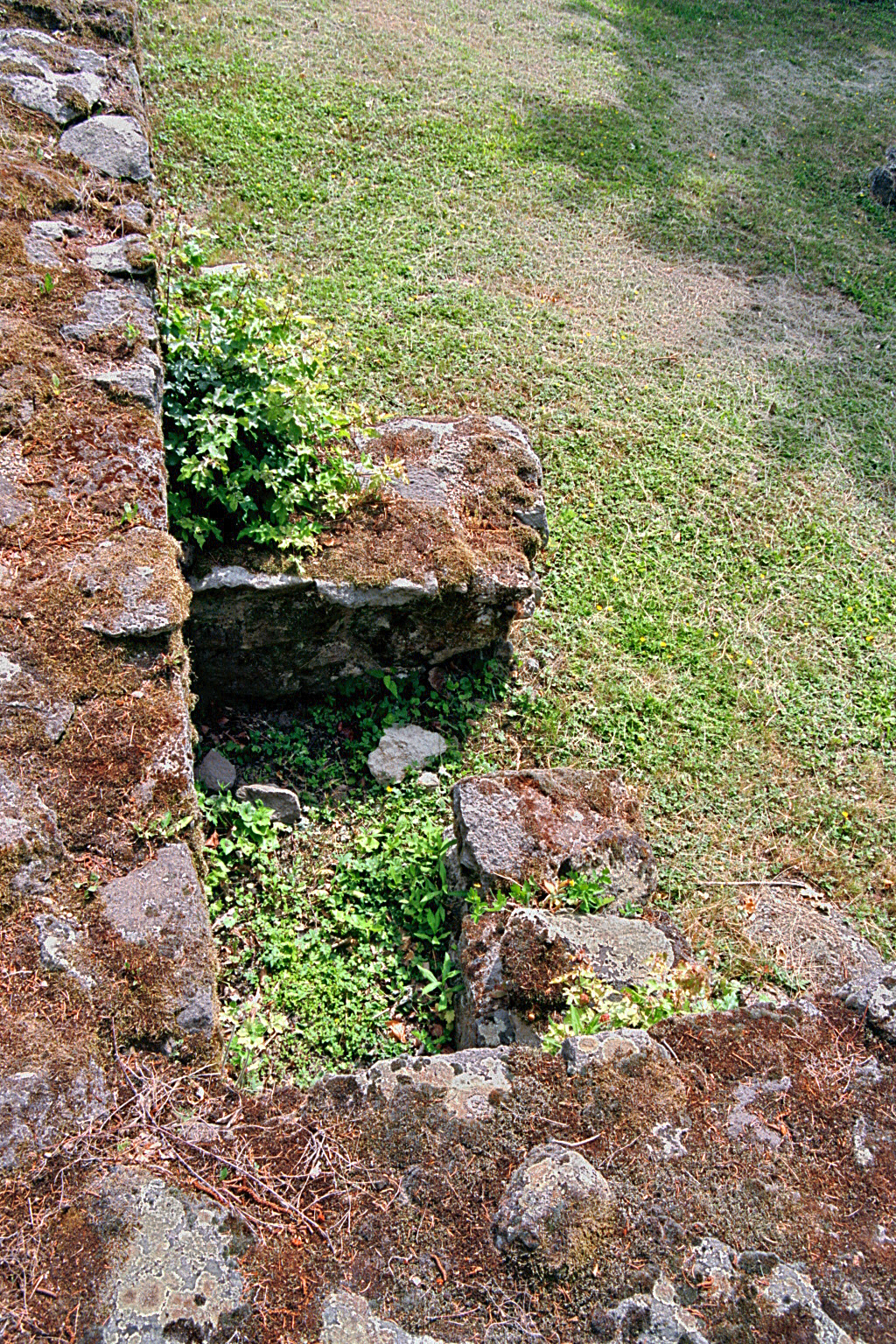 Visegrád-Steinbruch – Ungarn: Burgus Solva 24. Steinerner Ofen in der nordöstlichen Ecke des Turminneren.